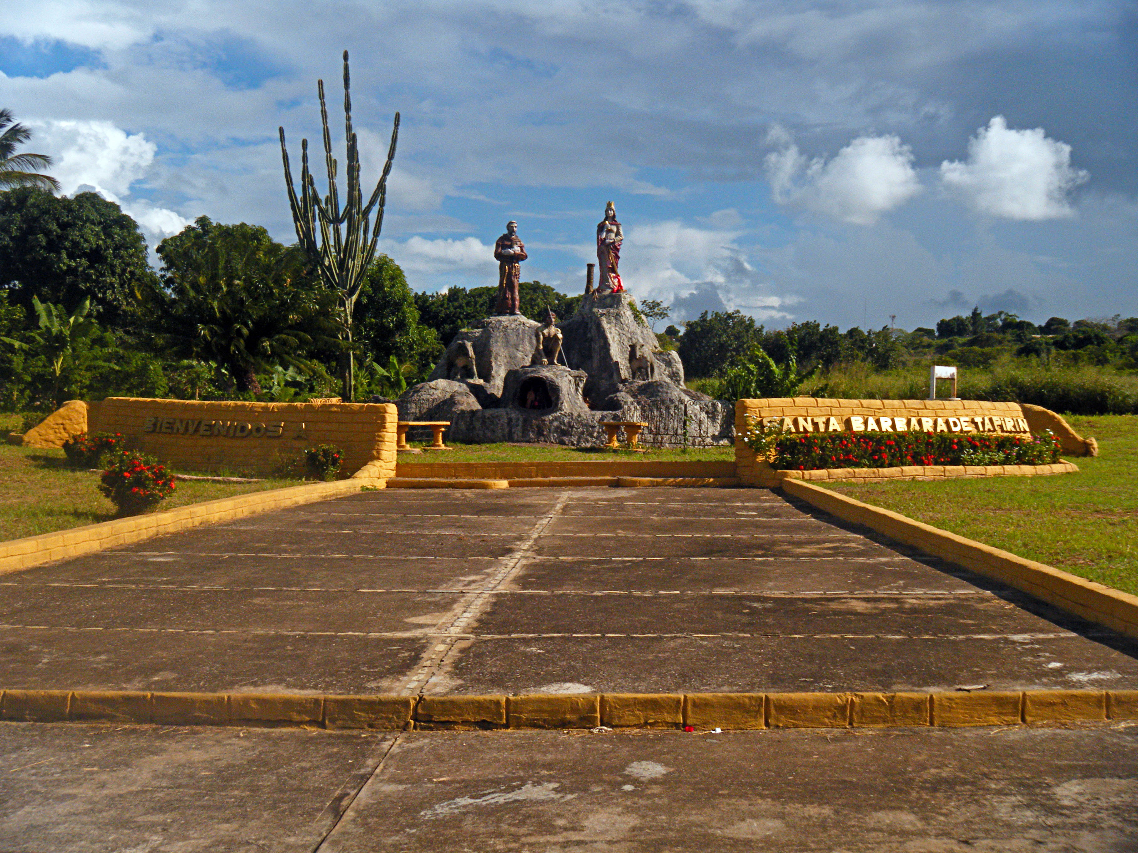 Monumento a Santa Barbara en la ciudad del mismo nombre en el Estado Monagas, Venezuela.